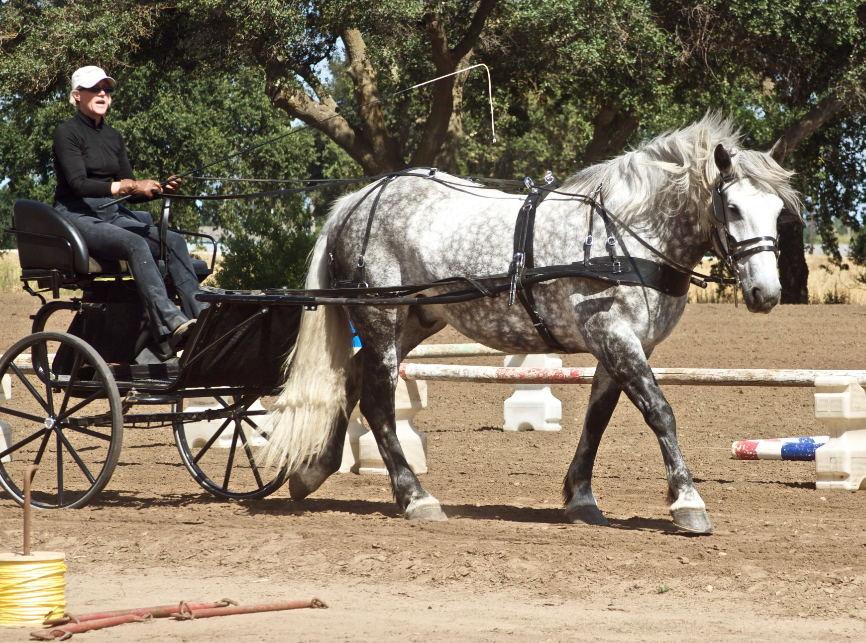 Percheron